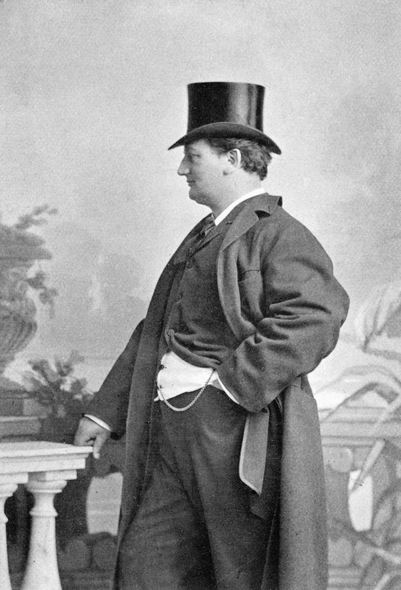 Henrik Klausen, norsk skådespelare, gästspelade på Kungliga teatern 1875